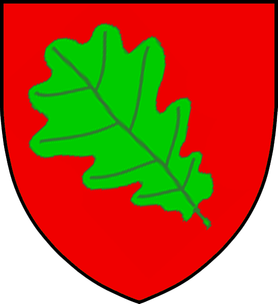 Vapensköld för adelsätten Ekeblad nr 35